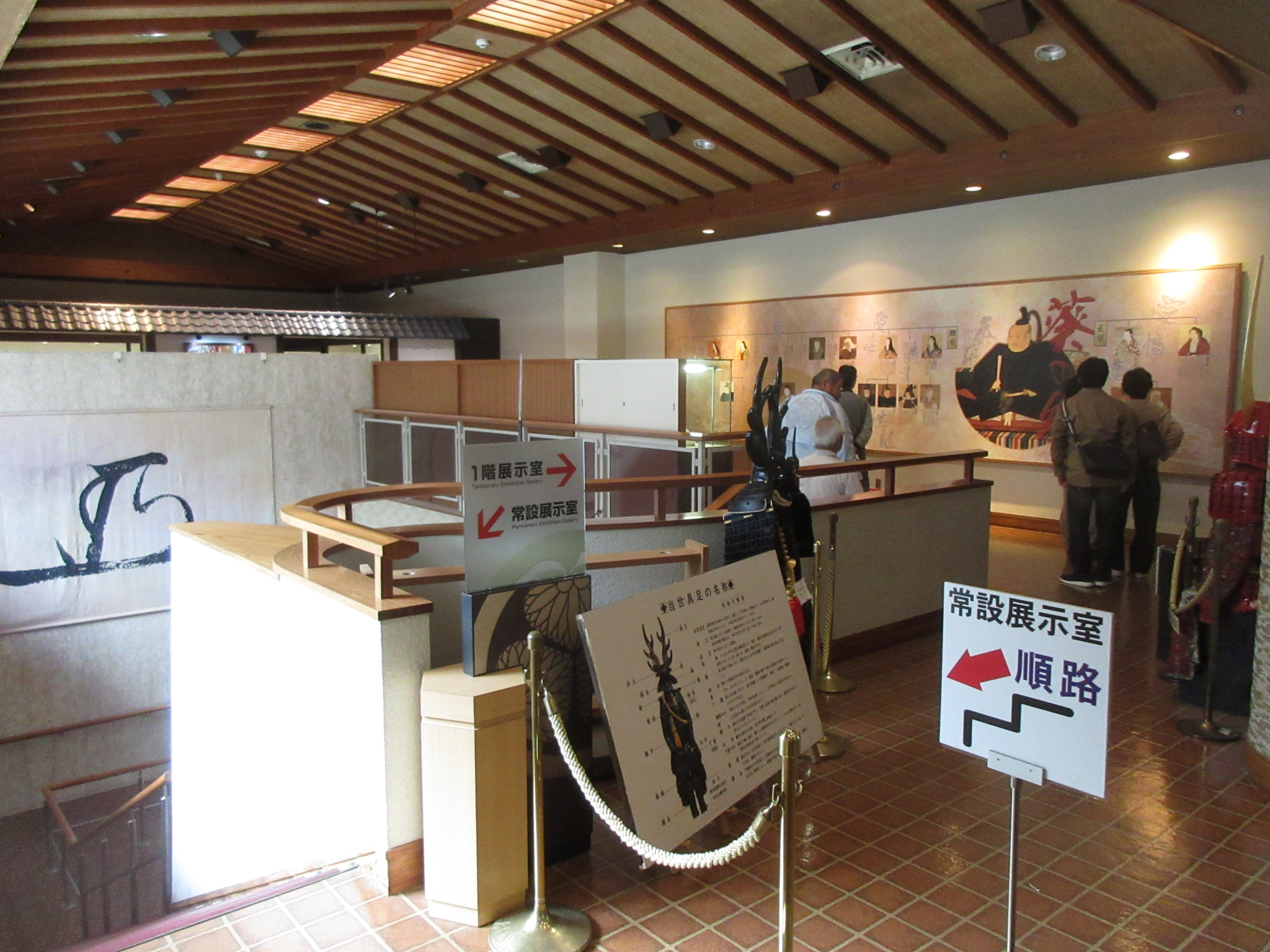 三河武士のやかた家康館